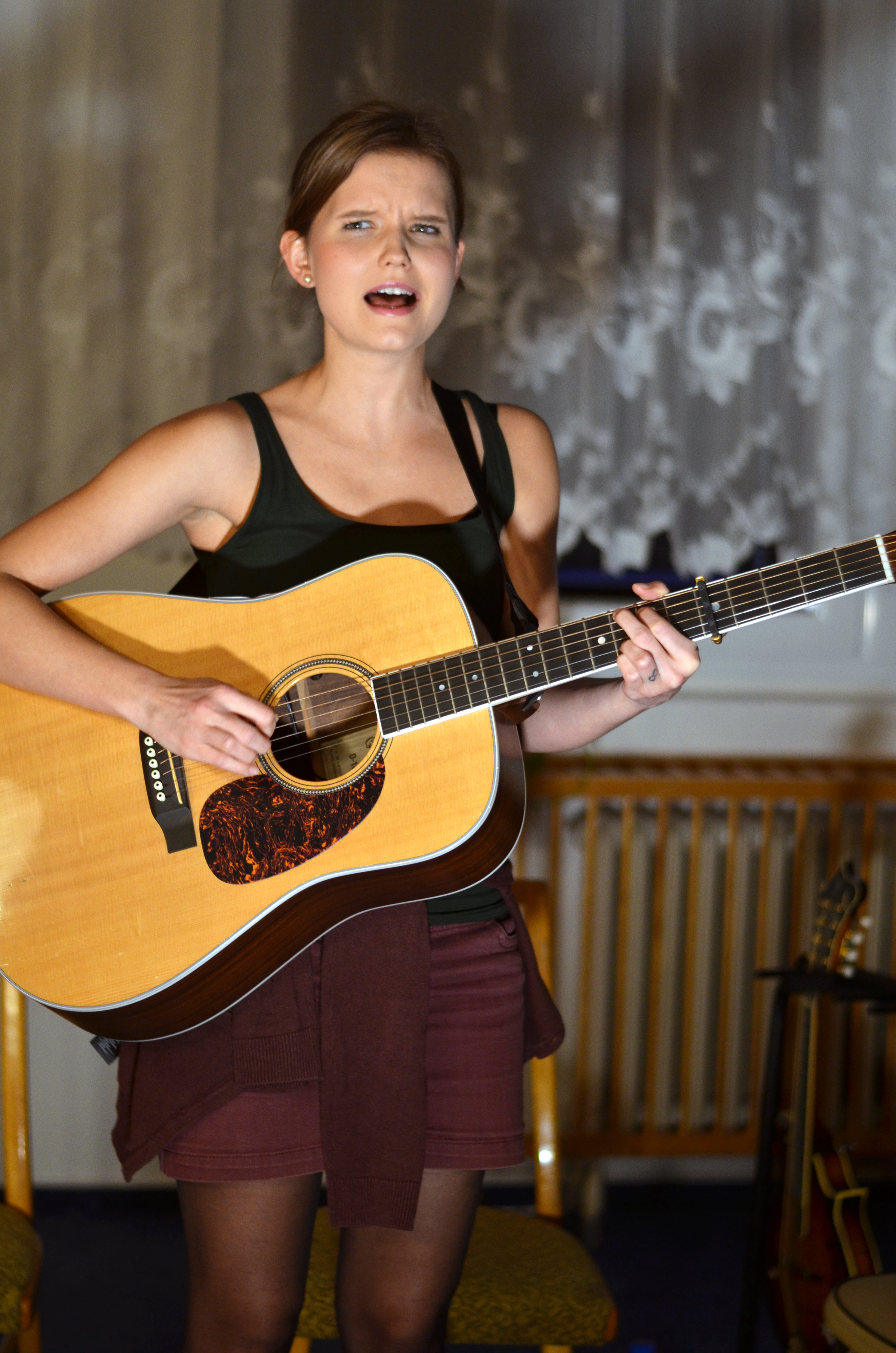 Adéla Jonášová na koncertě v Adamově